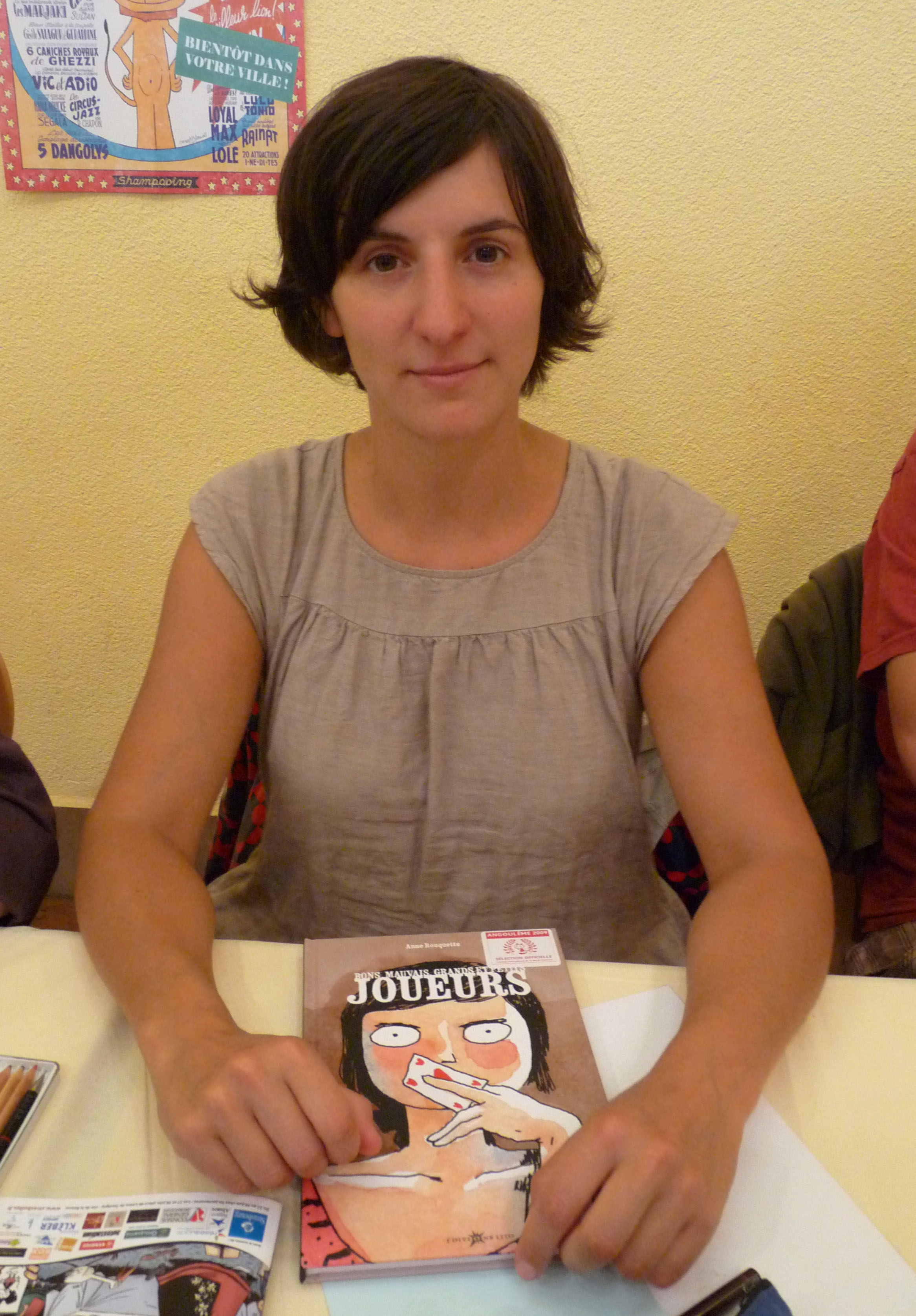 Anne Rouquette au Festival européen de la bande dessinée Strasbulles 2009